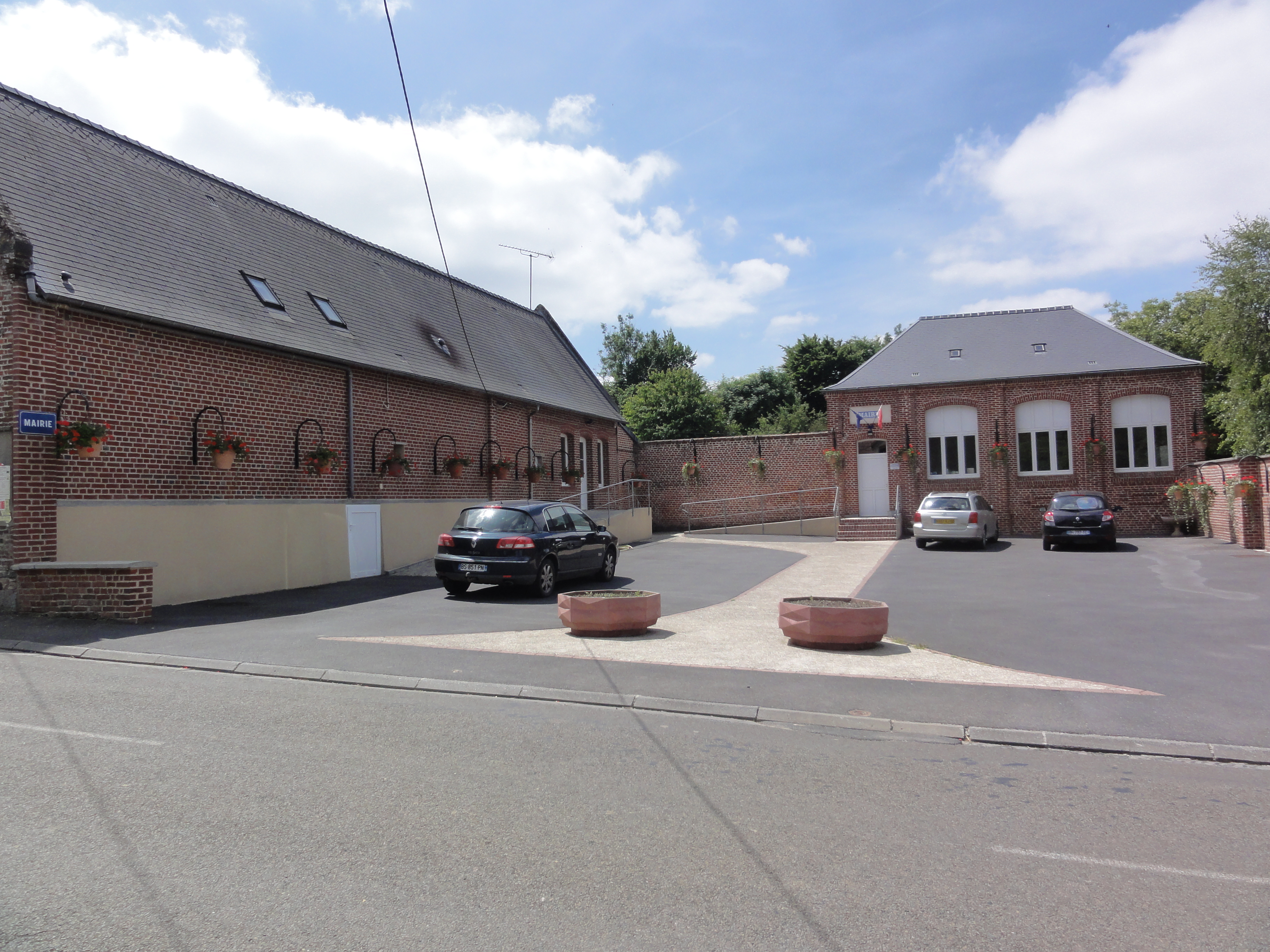 Iron (Aisne) mairie